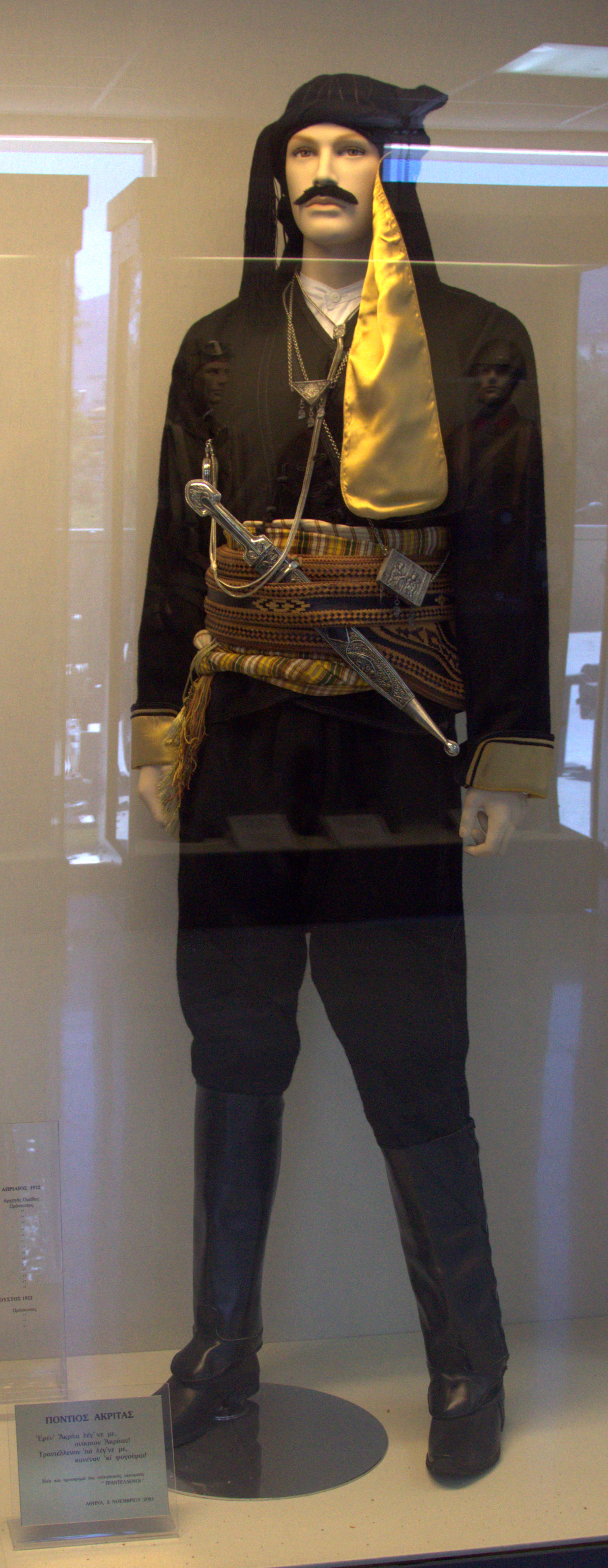 Πόντιος Ακρίτας. Πολεμικό Μουσείο Ελλάδος. Αθήνα.